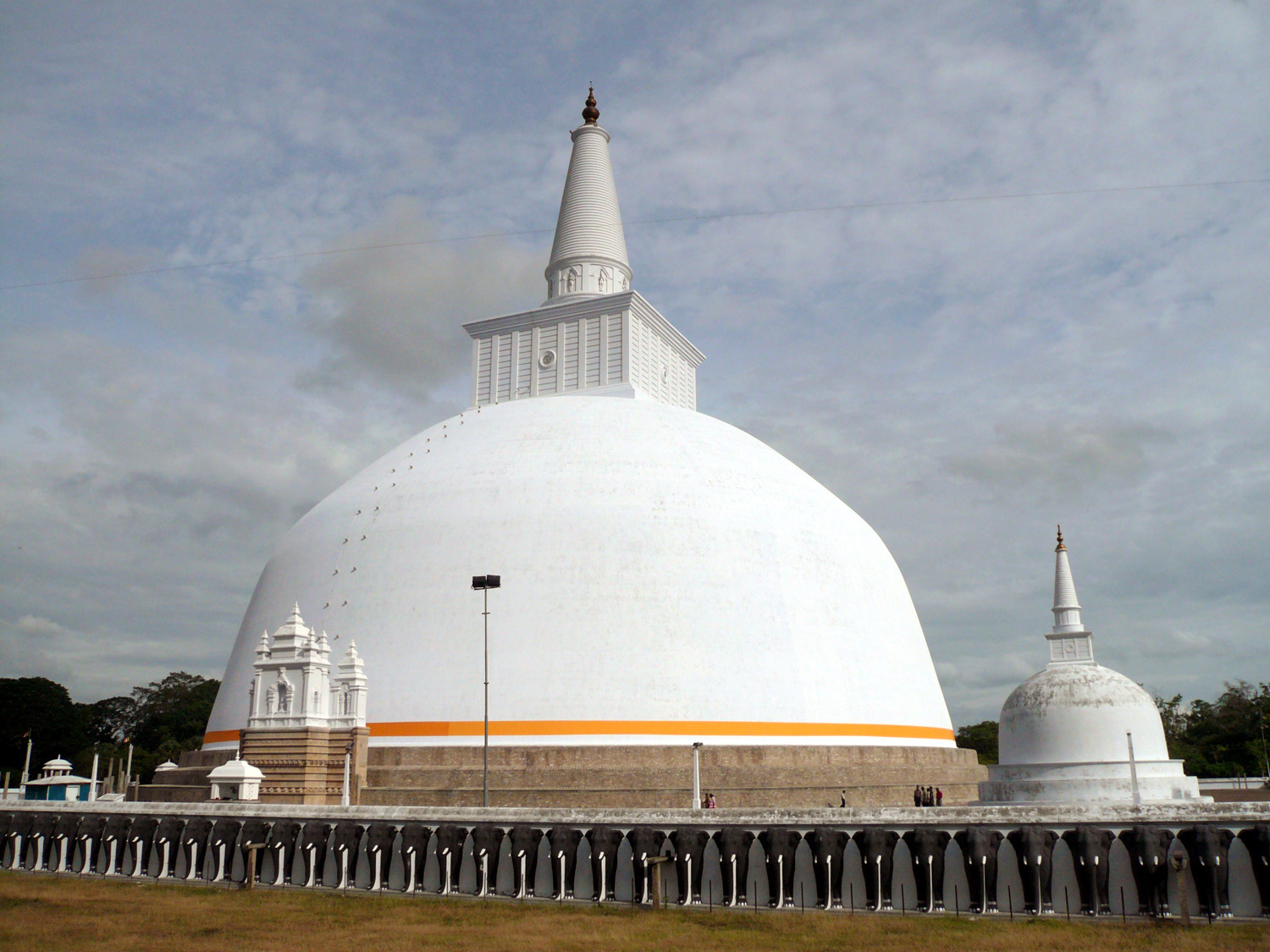 Ruwanwelisaya stupa in Anuradhapura, Sri Lanka.